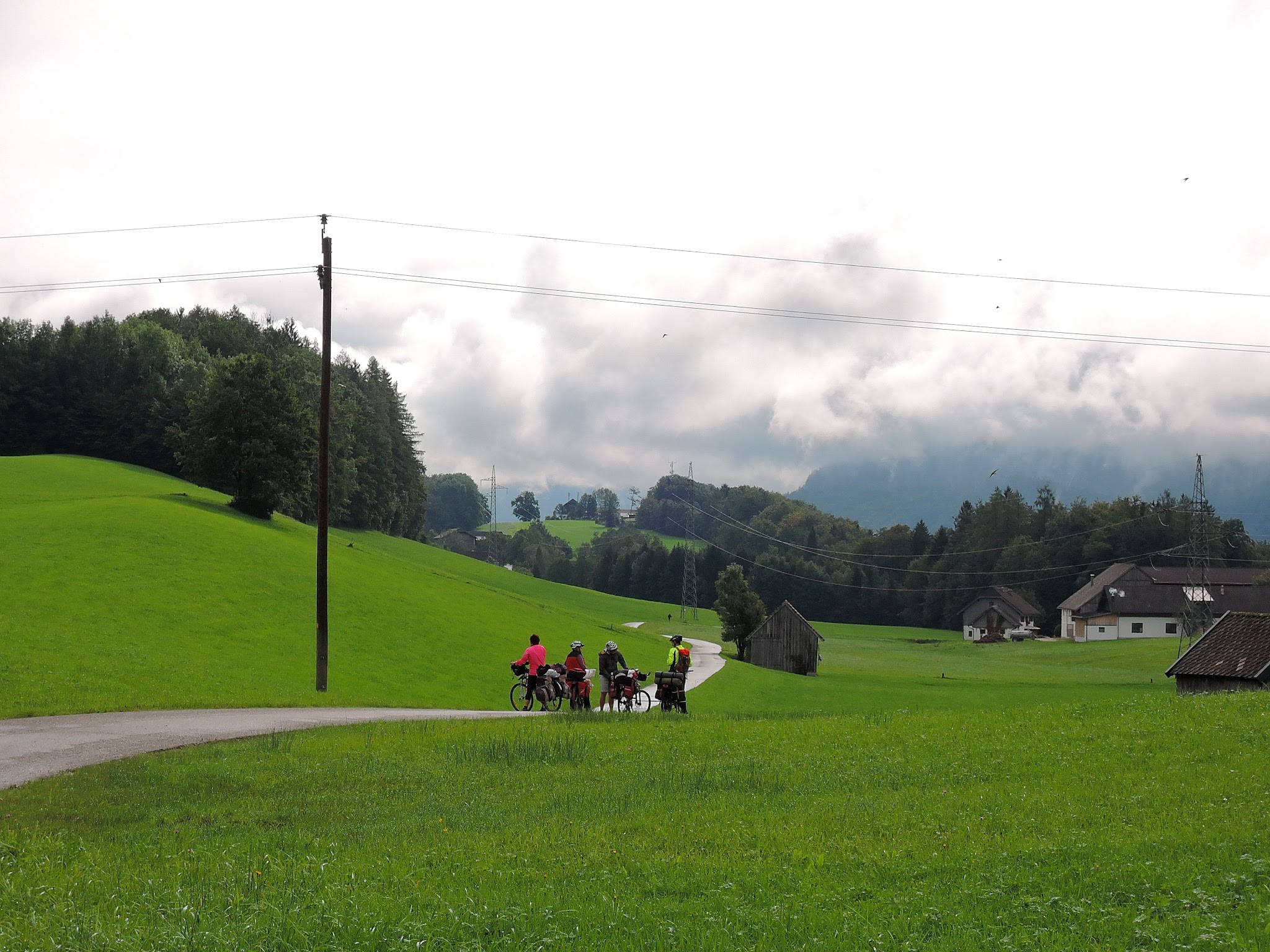 Gemeinde St. Wolfgang im Salzkammergut, Austria